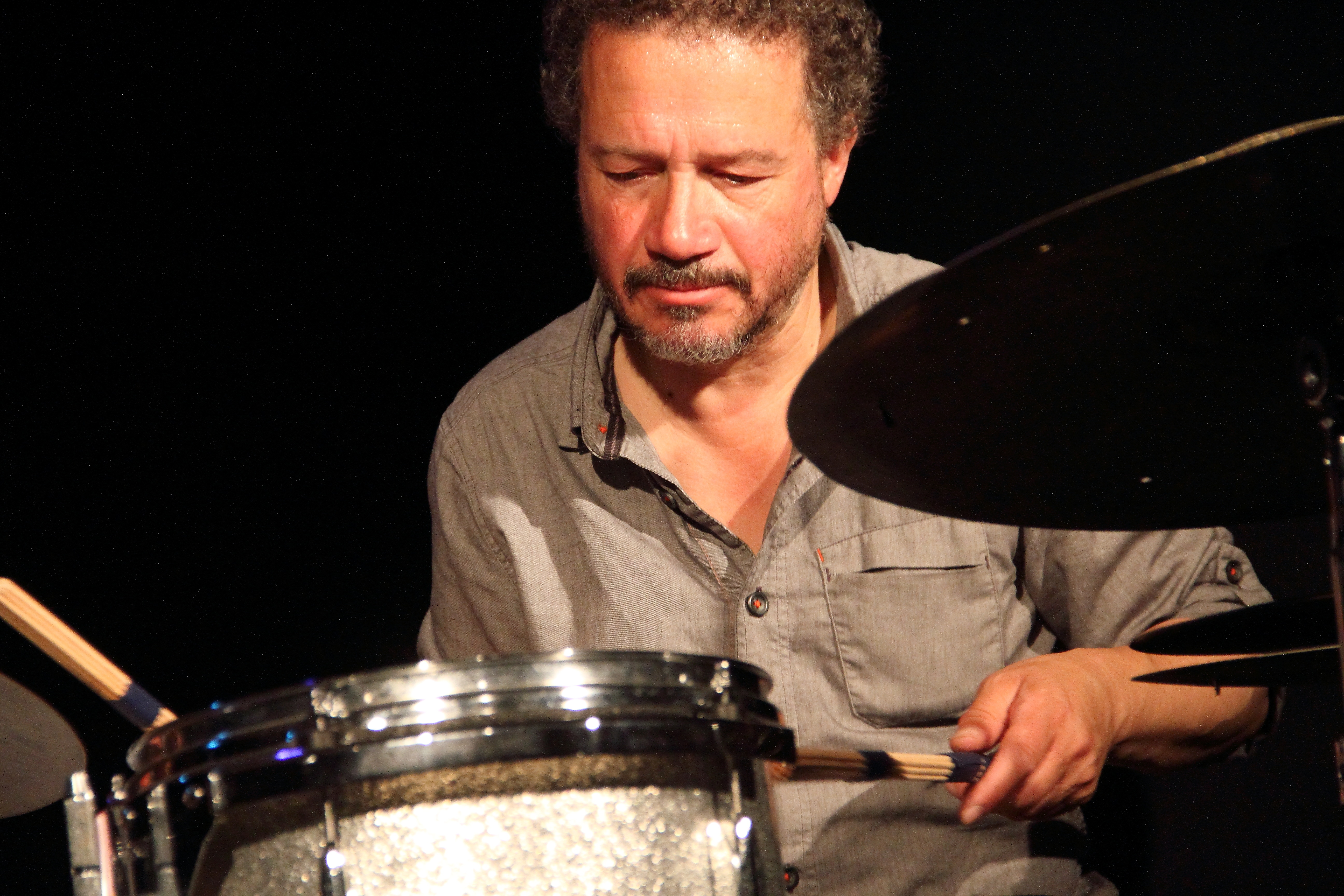 Konzert mit ROPE im KULT in Niederstetten. Eine Zusammenarbeit des Club W71 mit dem Kulturamt Niederstetten, ROPE sind: Uwe Oberg (Klavier) - Frank Paul Schubert (Sopransaxophon) - Paul Rogers (7-saitiger Bass) & Mark Sanders (Schlagzeug).